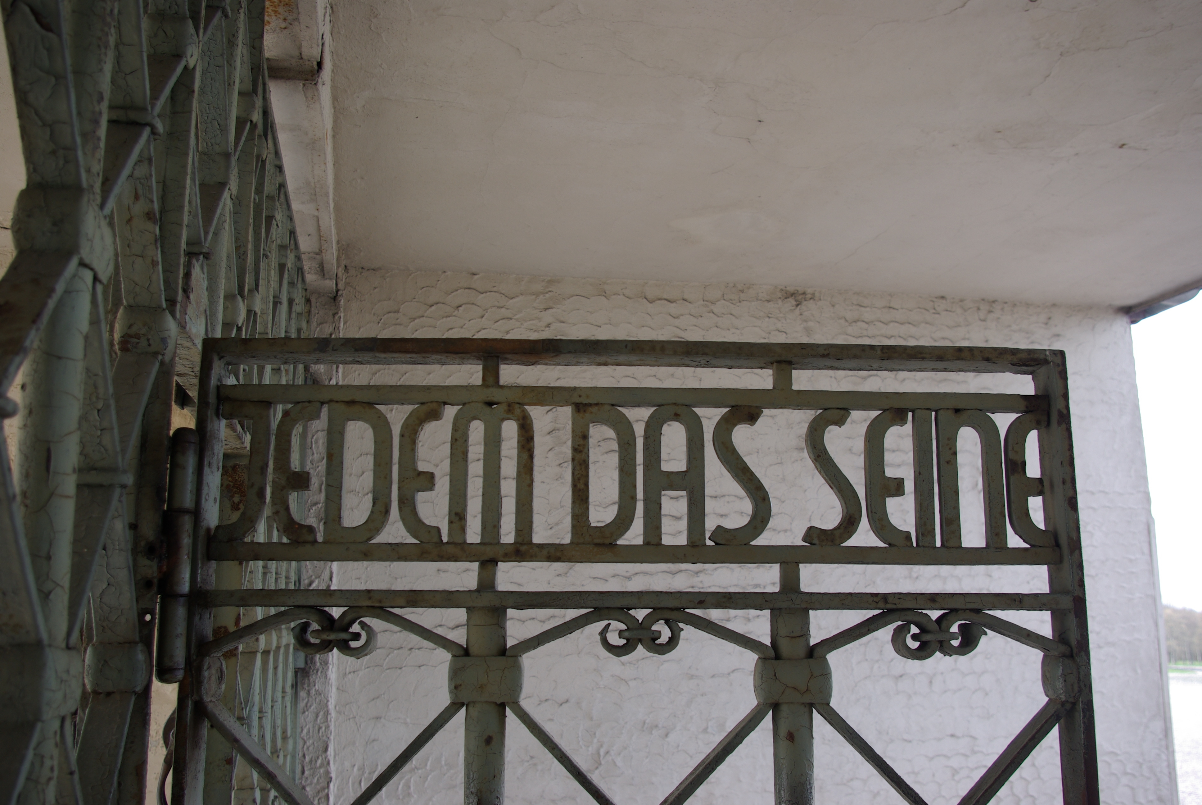 Konzentrationslager Buchenwald bei Weimar. Das Bild zeigt den Spruch Jedem das Seine an der Eingangstür des Lagers.